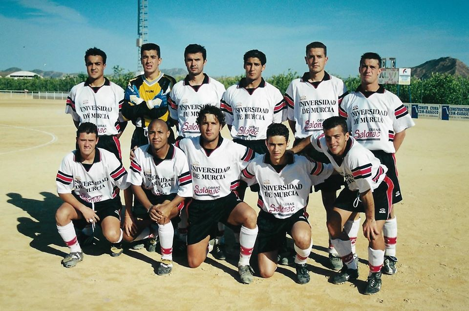 Alineación del Ciudad de Murcia contra el CD Alquerías el 08/04/2001